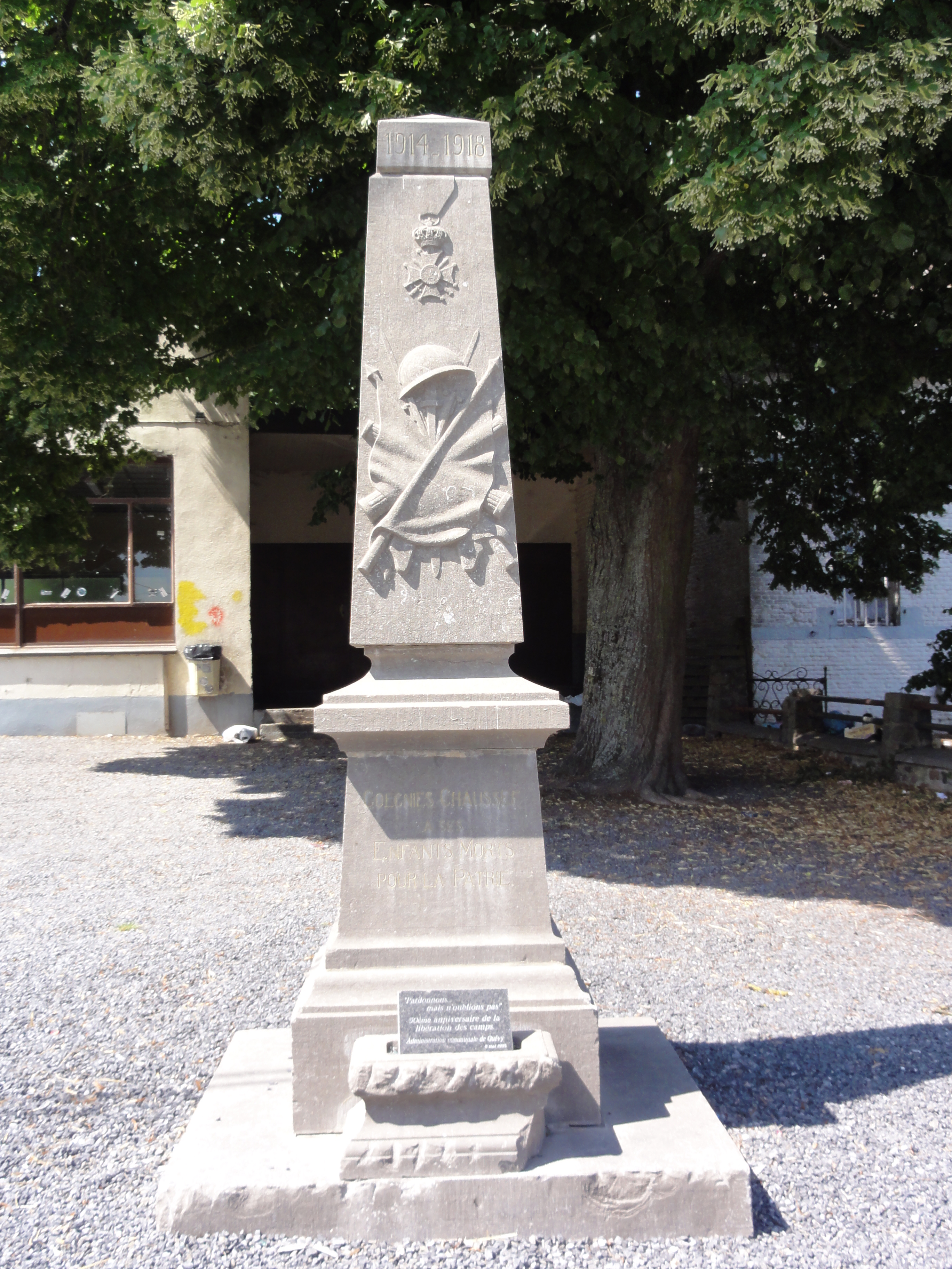 Gognies-Chaussée (Nord, Fr) monument aux morts